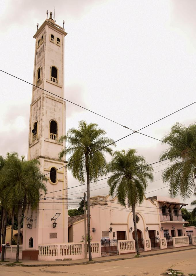 Iglesia Nuestra Señora del Valle - Barrio Guemes